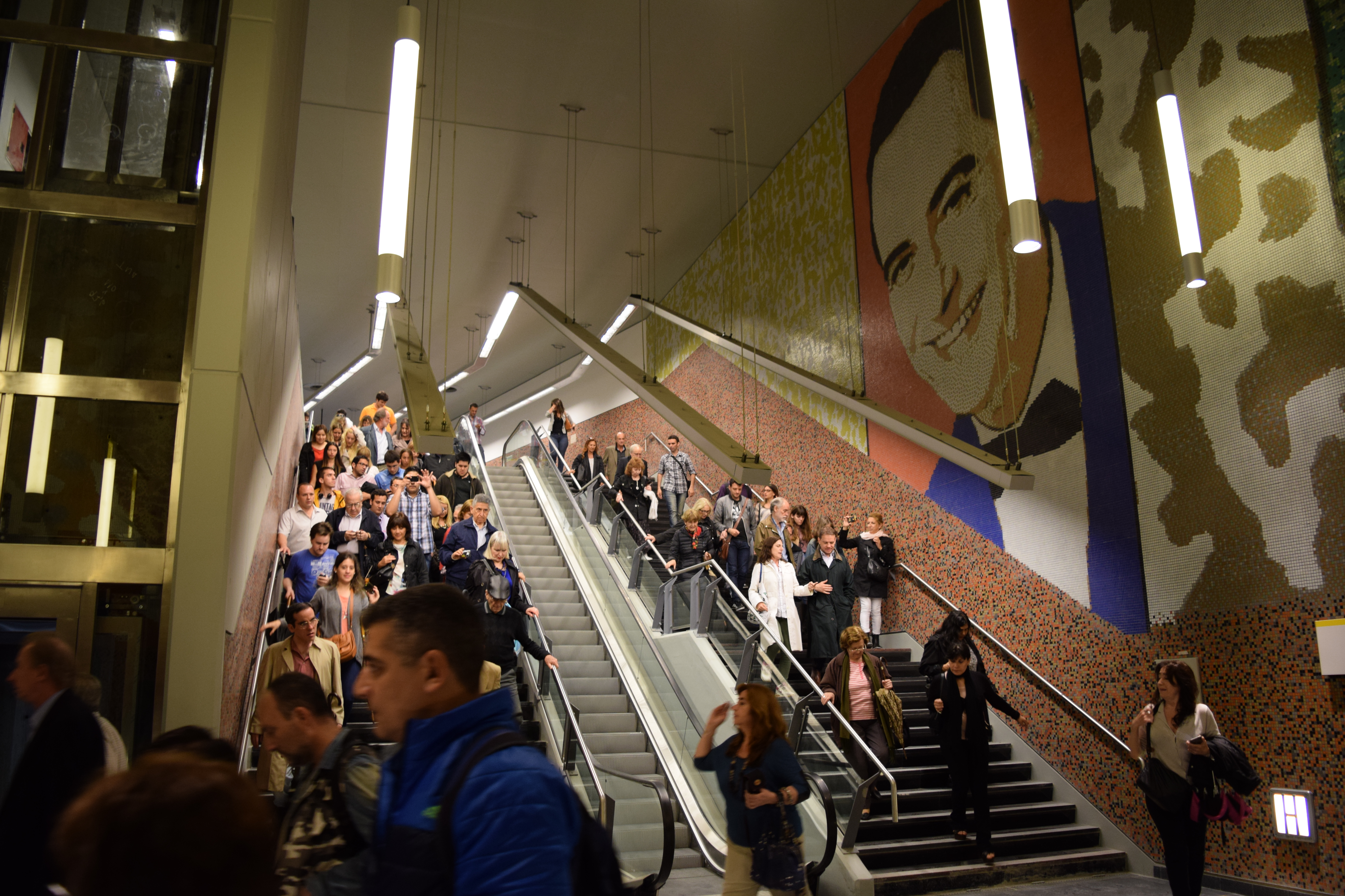 Interior de la estación Las Heras, de la Línea H del Subterráneo de Buenos Aires, durante su etapa final de construcción.